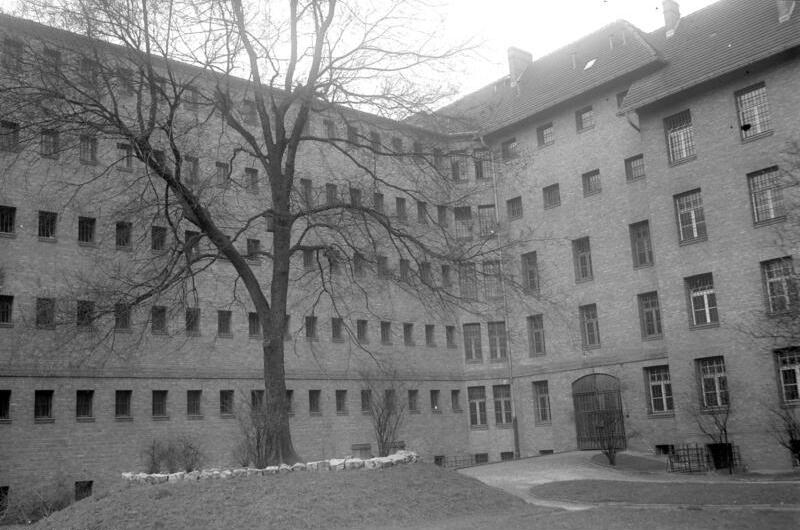 Ein Blick in das Frauengefängnis in der Barnimstr. in Berlin ! Der Hof des Frauengefängnisses. Hier absolvieren die Gefangenen ihren täglichen Rundgang.